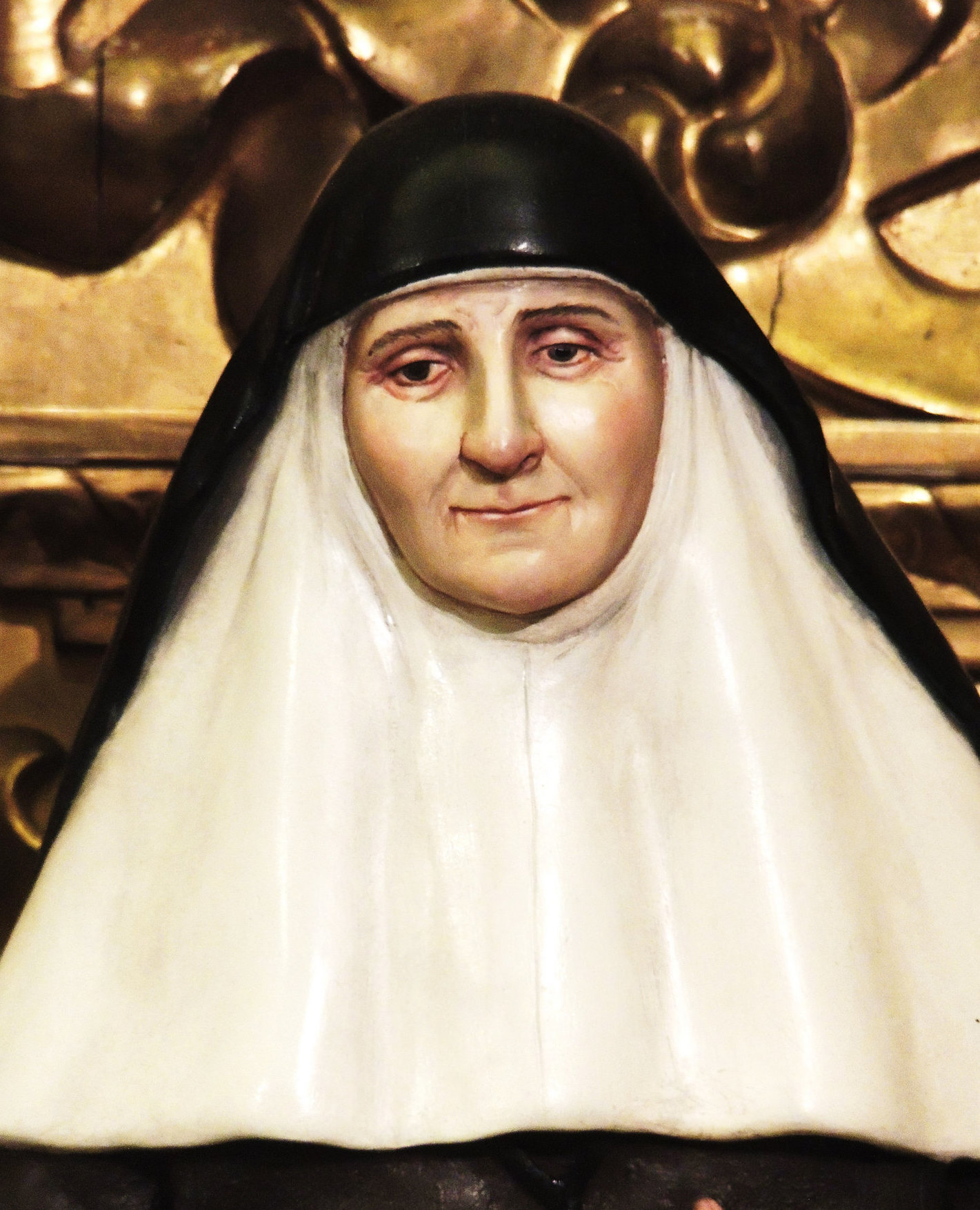 Imagen de Santa María de la Purísima de la Cruz, venerada en la Basílica de la Esperanza Macarena (Sevilla)